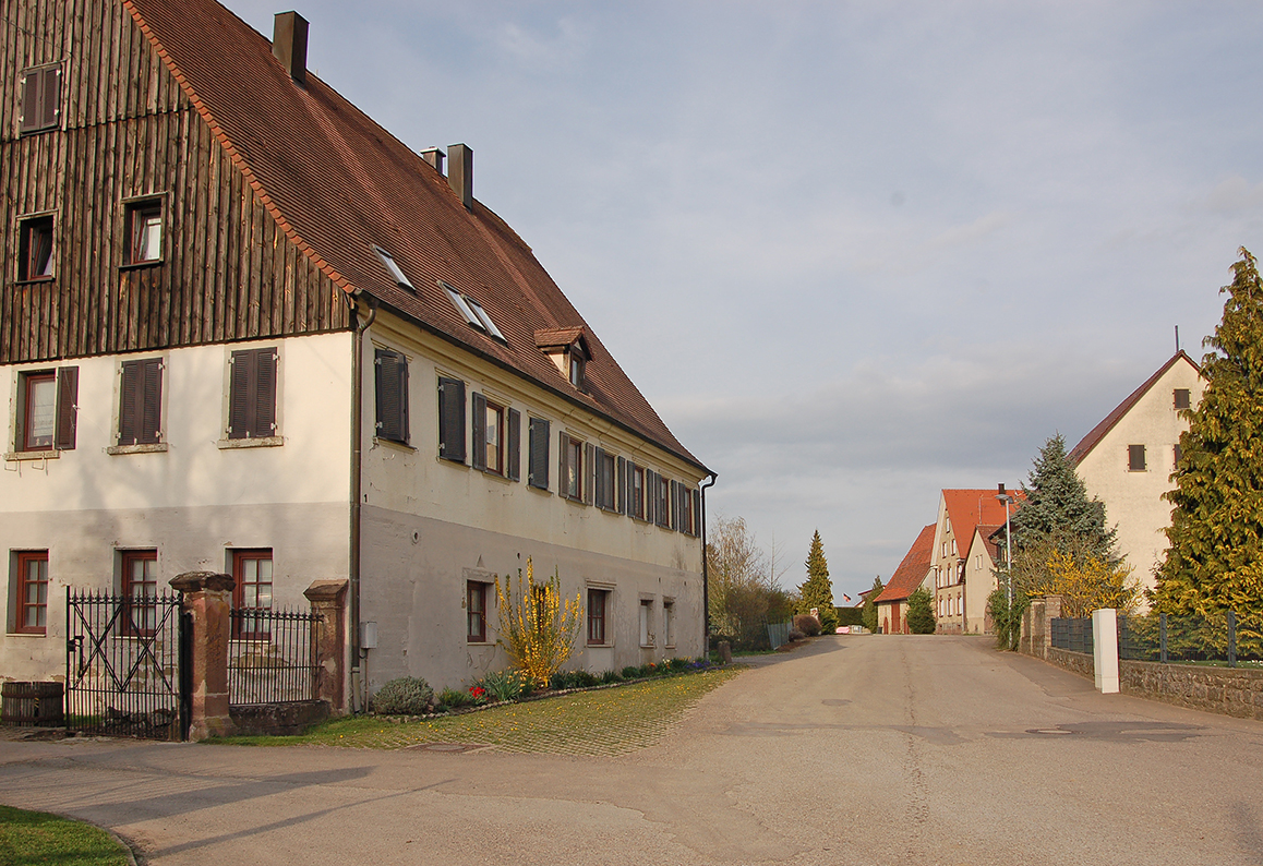 Blick durch Pulverdingen, entlang von Gebäude Nr. 1 (links)